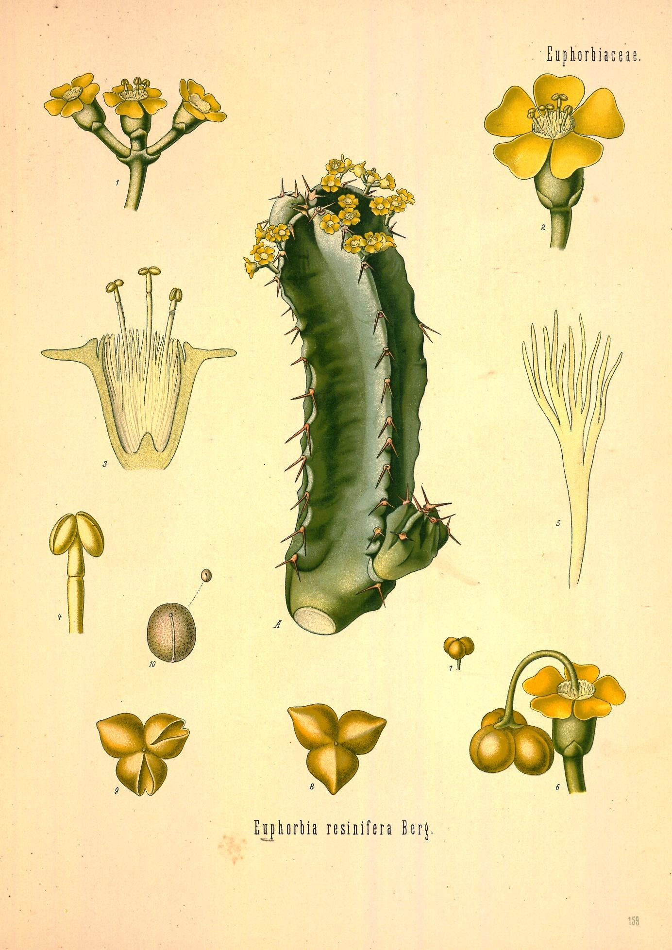 Euphorbium. A Ast mit Blüthe, nat. Grösse; 1 3köpfiger Blüthenstand, vergrössert; 2 Cyathium, desgl.; 3 männliches Cyathium im Längsschnitt, desgl.; 4 männliche Blüthe, desgl.; 5 Deckblatt- oder Spreuschuppe, desgl.; 6 ein fruchttragendes Cyathium, desgl.; 7 Fruchtkapsel, nat. Grösse; 8 Fruchtkapsel von oben, vergrössert; 9 dieselbe im Aufspringen, desgl.; 10 Same von der Bauchseite.